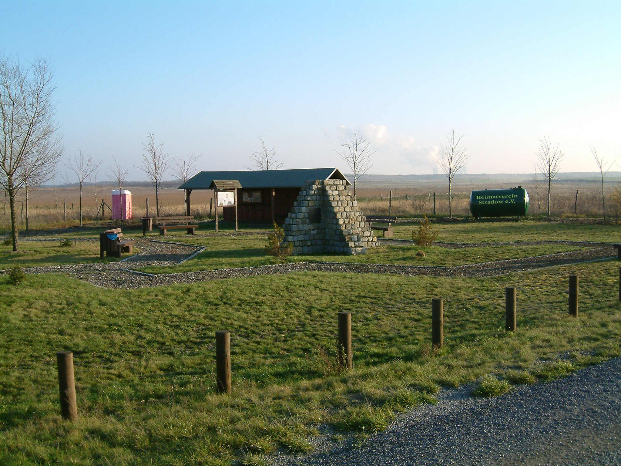 Die Ortslage Stradow heute. Durch den Heimatverein Stradow e.V. hergerichtete Erinnerungsstätte